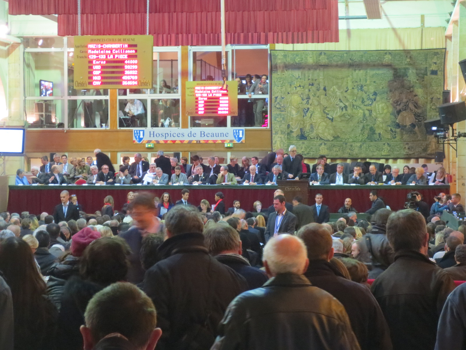 Vente des hospices de Beaune 2013, présidée par Clotilde Courau et Jean-Pierre Castaldi